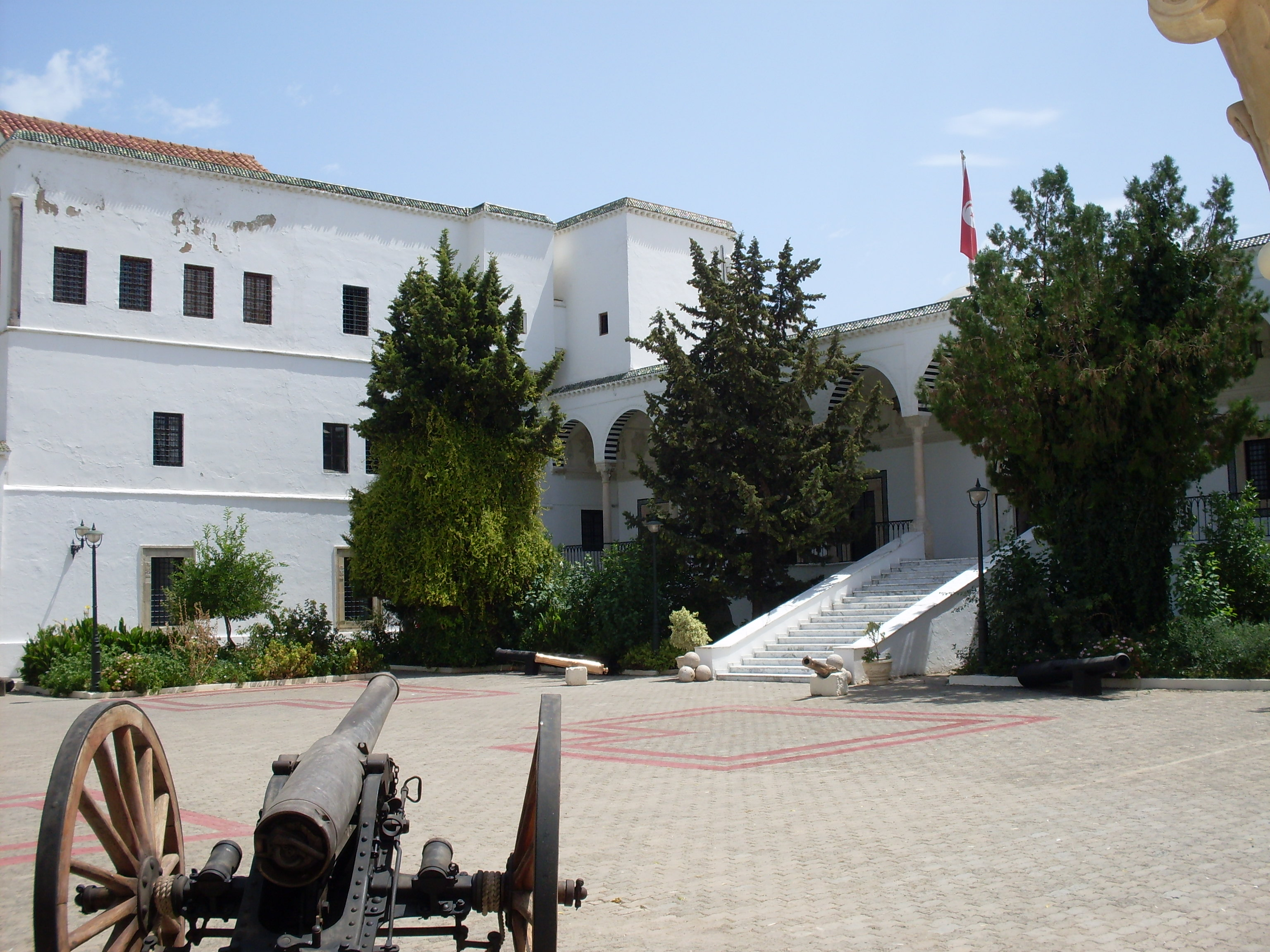 Entrée du palais de la rose Manouba Tunisie